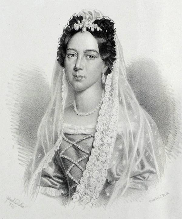 Maria Dorothea von Württemberg, Lithographie